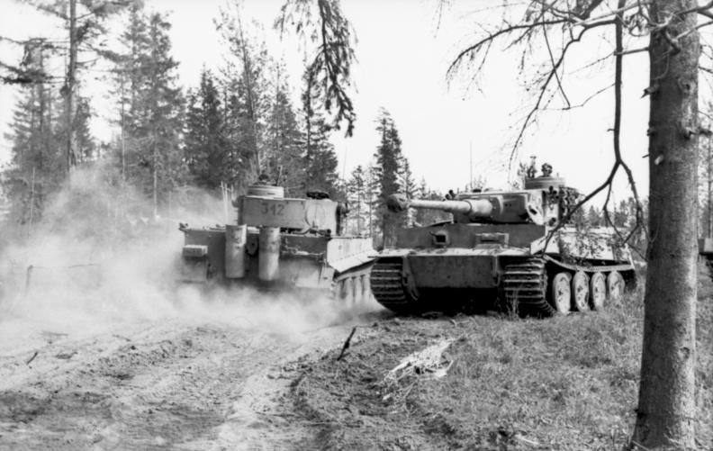 "Tiger nach vorn" Bei den schweren Abwehrkämpfen südlich des Ladogasees brinden die "Tiger"-Panzer der hart kämpfenden Infanterie immer wieder fühlbare Entlastung und fügen dem bolschewistischen Gegner schwere Verluste an Menschen und Material zu. Während die einen zum Munitionieren zurückfahren, rollen schon wieder neue in den Kampf. PK-Aufn.-Zwirner-Atlantic, 31.8.1943 [Herausgabedatum] Information added by Wikimedia users.Schwere Panzer-Abteilung 502 (only unit ever near Ladoga)[1]